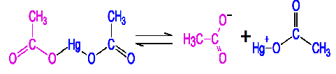 Acetato de mercúrio se dissociando